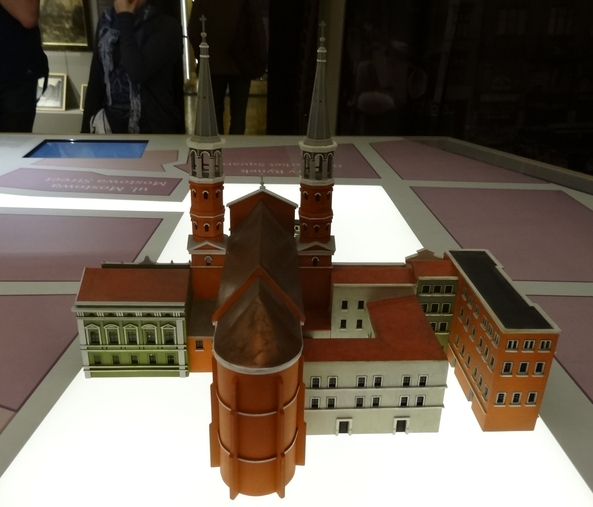 Model zachodniej pierzei Starego Rynku w Bydgoszczy z kościołem jezuickim na wystawie w Muzeum Okręgowym im. Leona Wyczółkowskiego w Bydgoszczy w spichrzach przy ul. Grodzkiej